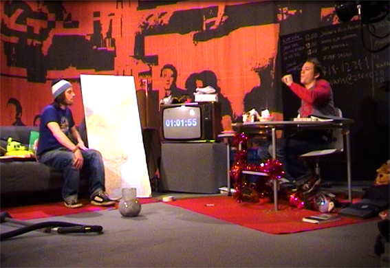 TV-program, Wimans, ZTV, 24 timmar live.